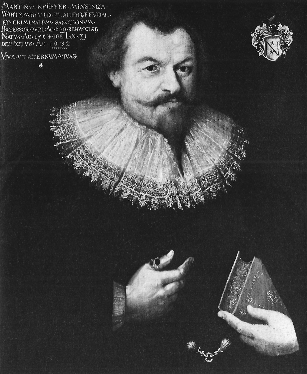 Prof. Martin Neuffer (Ölblidnis in der Tübinger Professorengalerie)